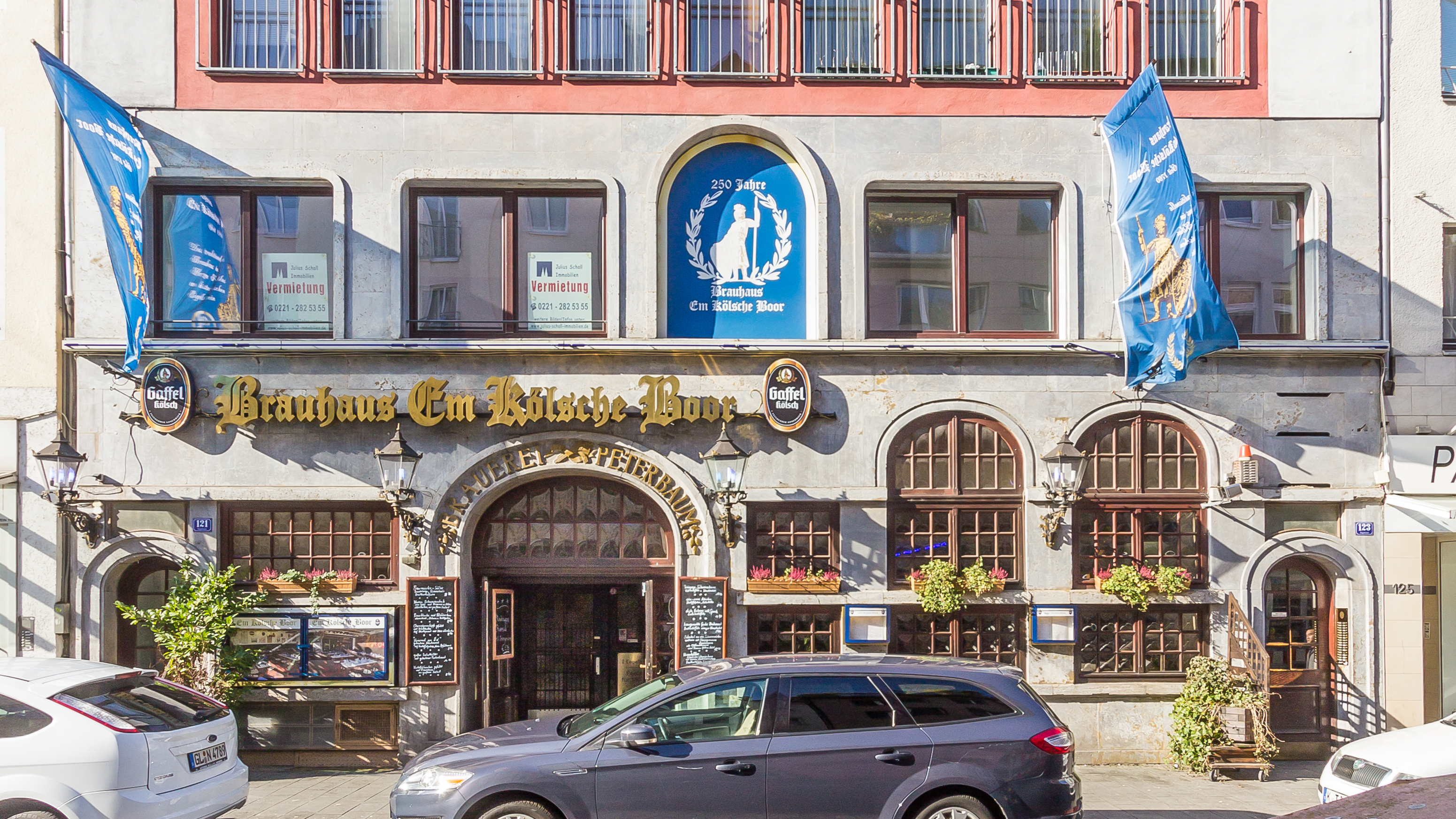 Em Kölsche Boor, Eigelstein 121-123, Köln